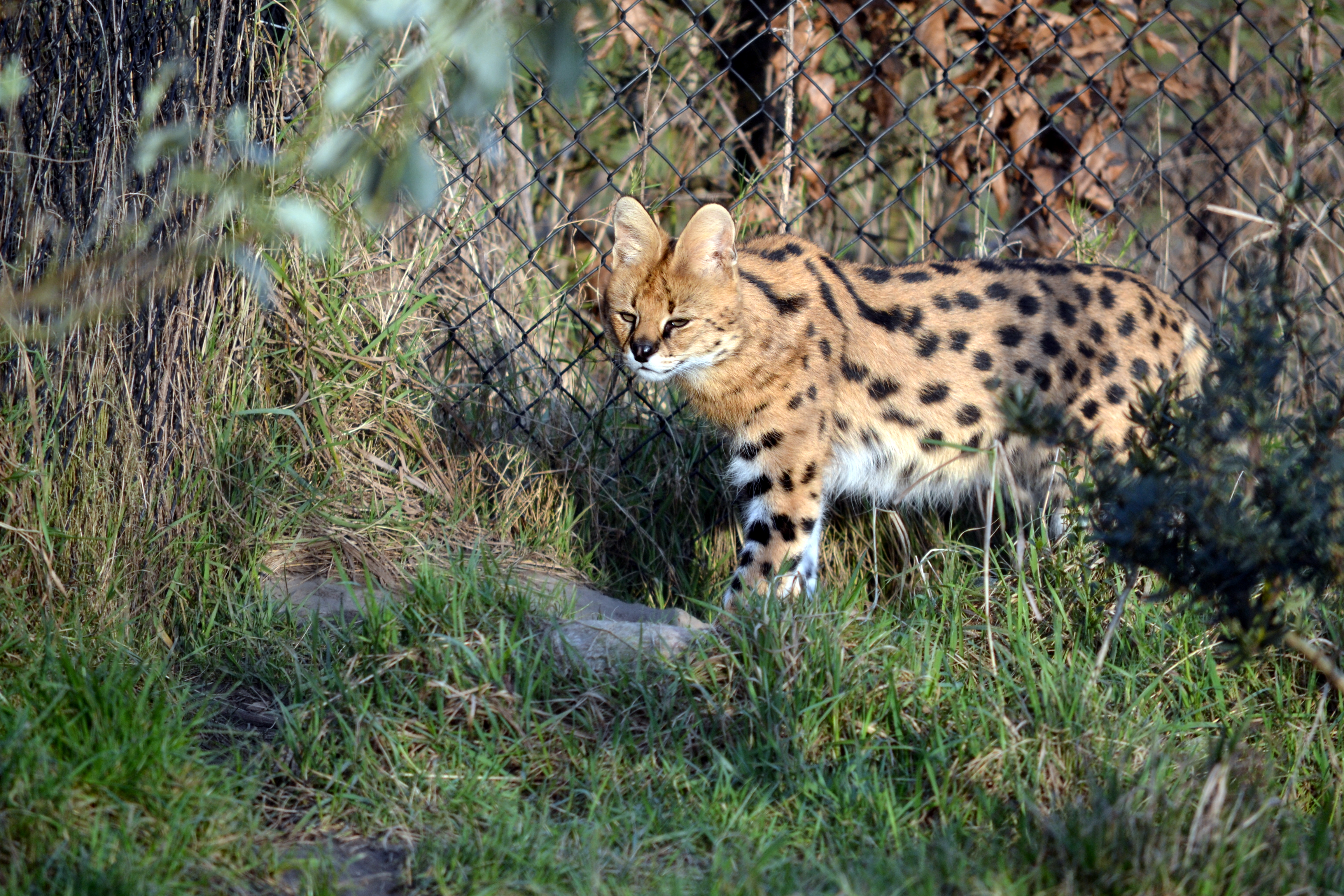 Deze foto is gemaakt in Diergaarde Blijdorp. This picture was taken at Rotterdam Zoo.